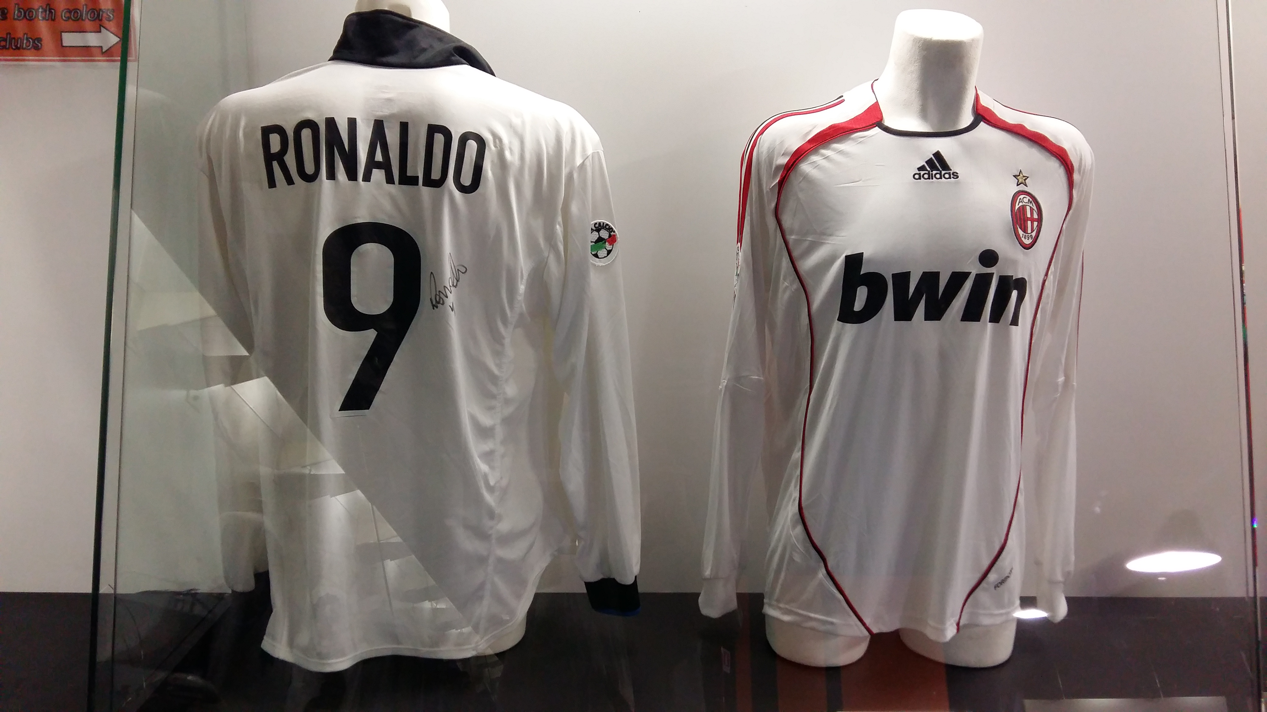 Футболки Роналдо в музее Сан-Сиро.